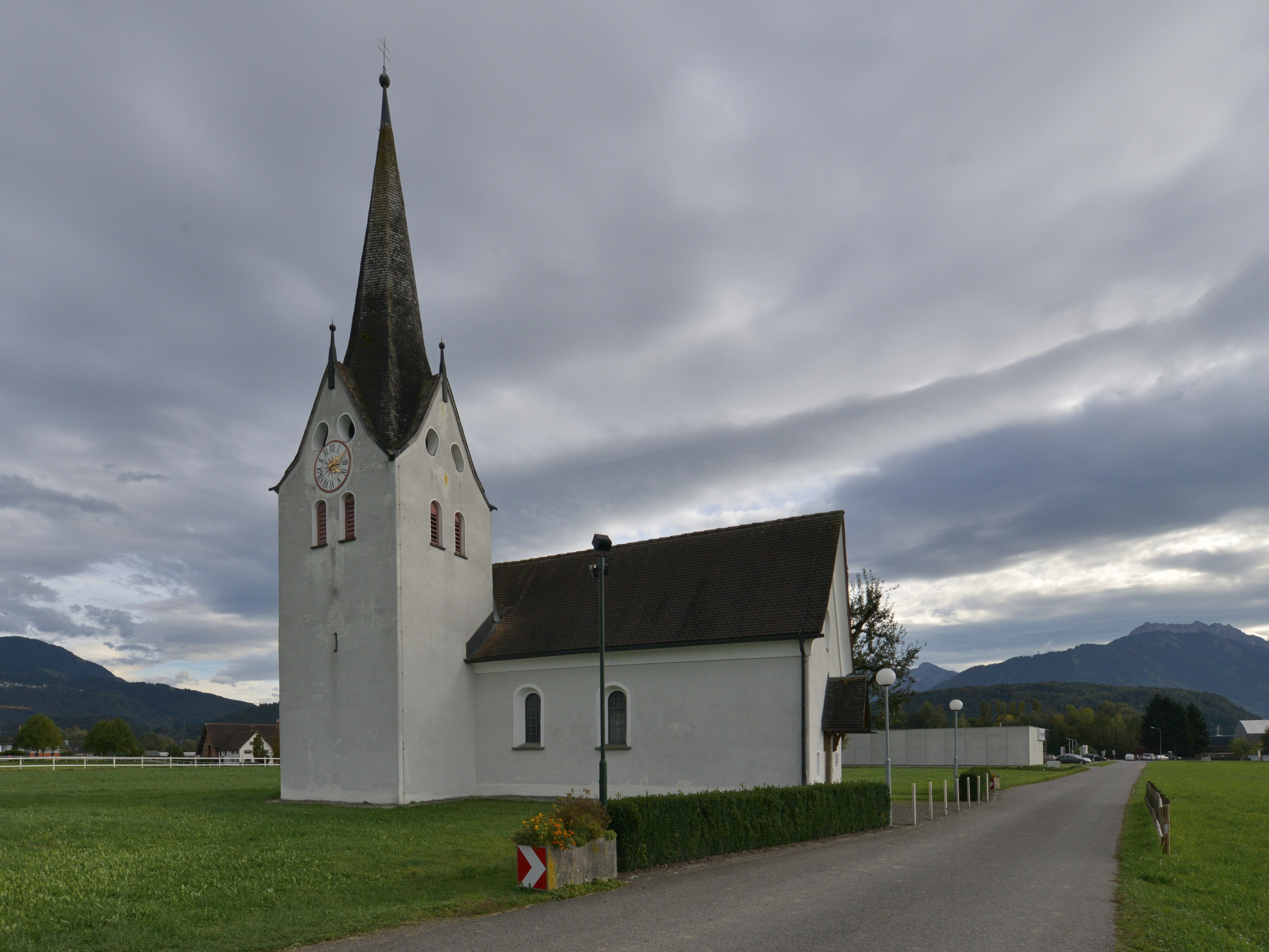 Kapelle (ehemals Filialkirche) "hl. Anna" in Rankweil, (Brederis).